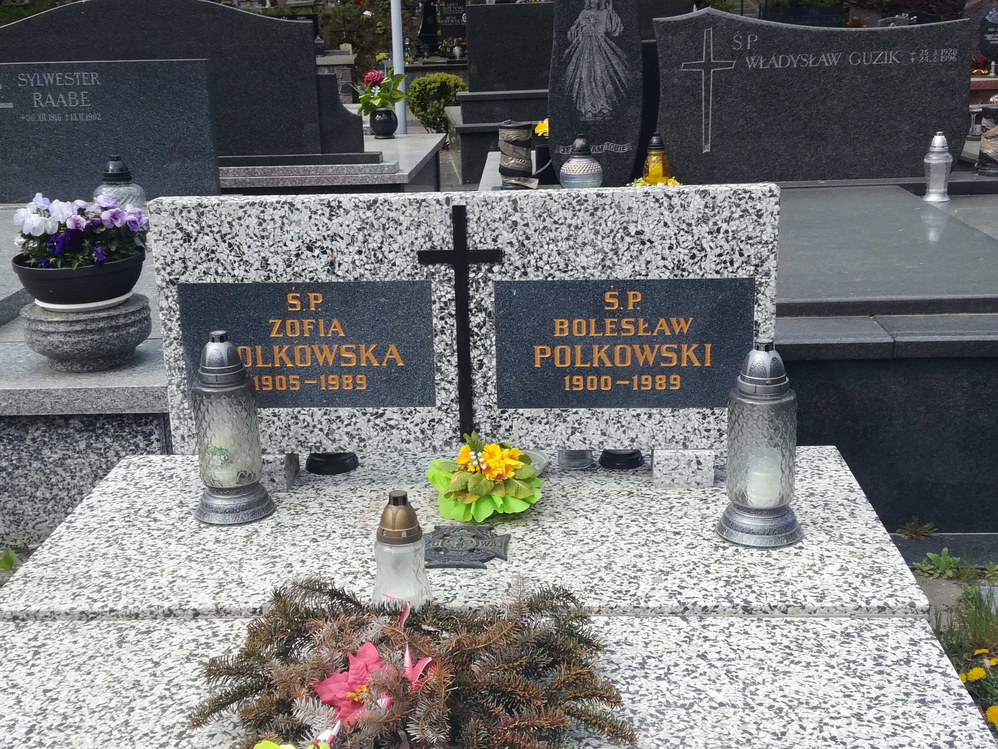 Grób Bolesława Polkowskiego na Cmentarzu Witomińskim